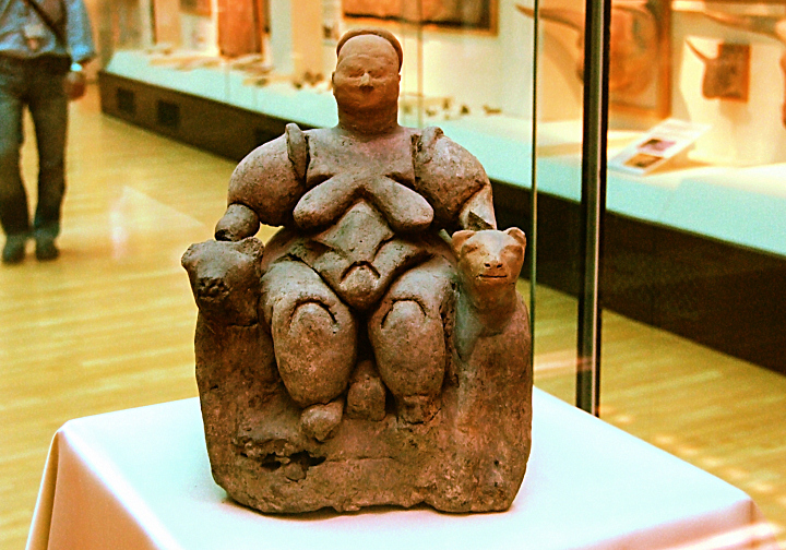 Bogini Matka z Çatalhöyük (Turcja), neolit (ok. 5500-6000 pne.), obecnie w Muzeum Cywilizacji Anatolijskich w Ankarze; Mother Goddes from Çatalhöyük (Turkey), neolithic age (about 5500-6000 BC), today in Museum of Anatolian Civilizations in Ankara